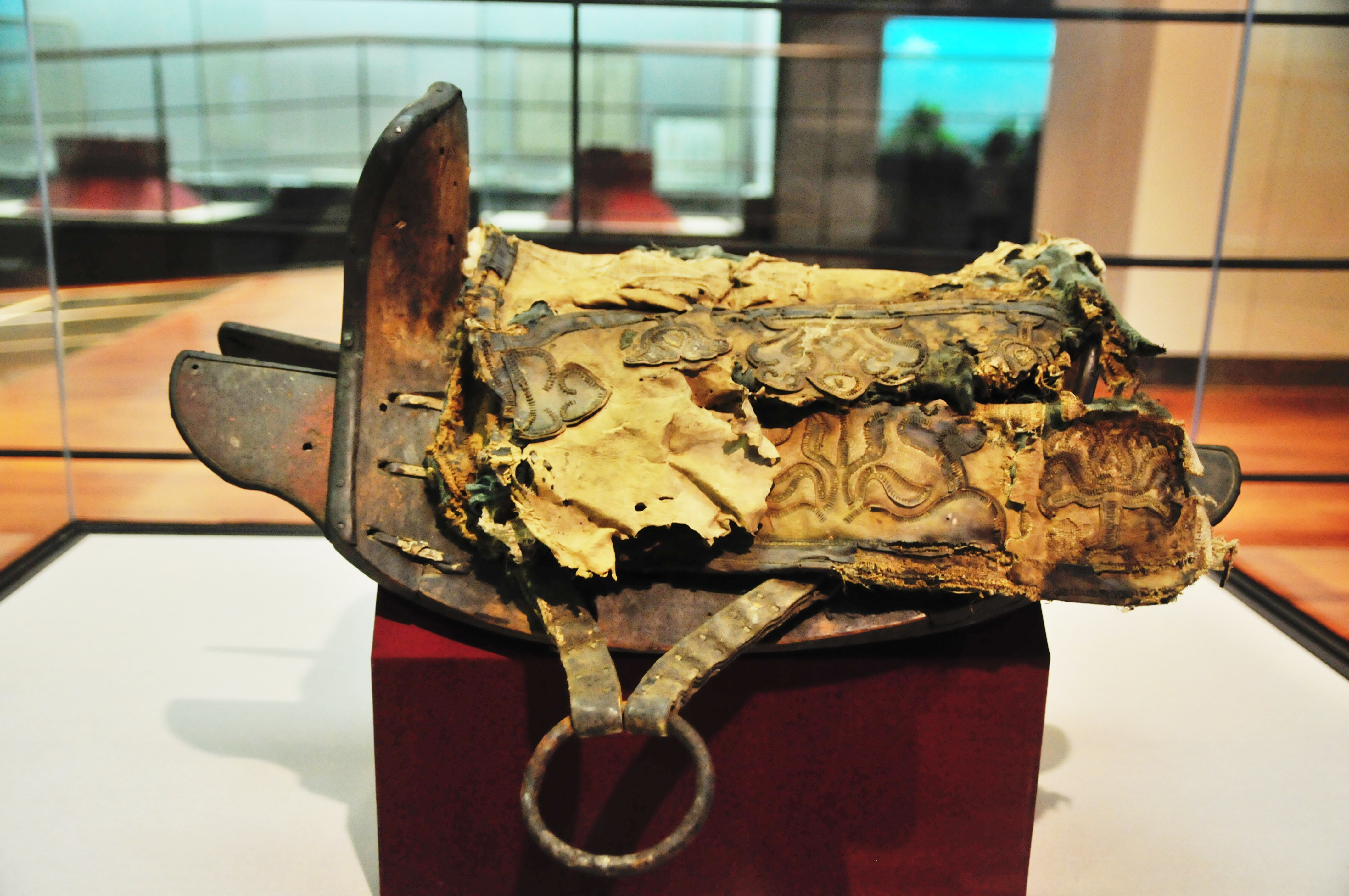 곽재우 유물 말안장